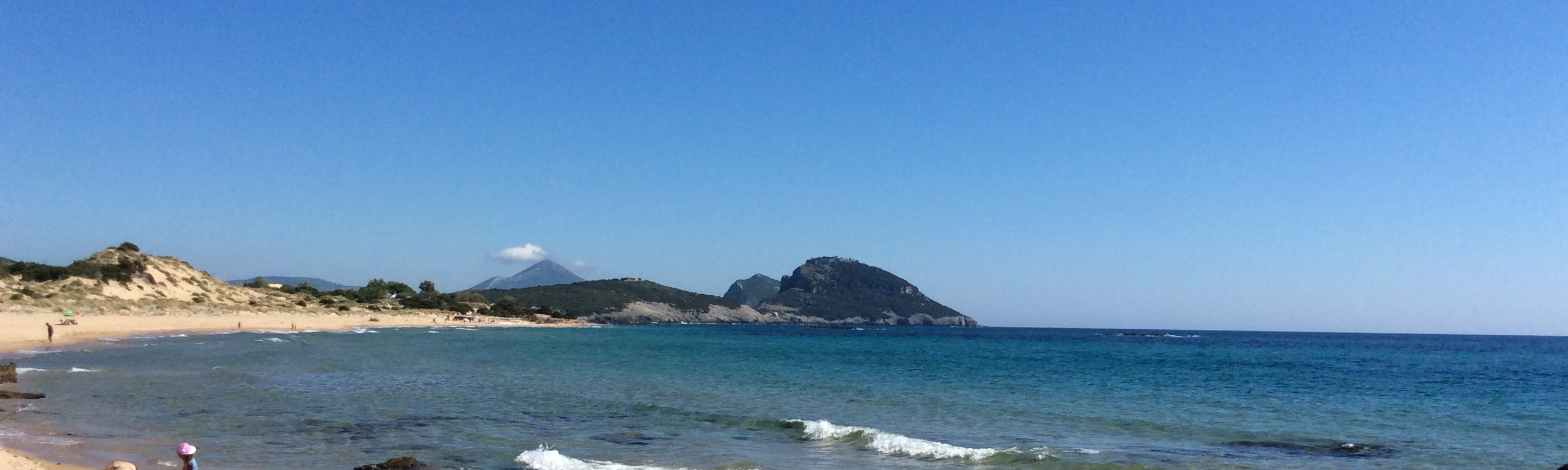 Ακρωτήριο του Ζόγκλου (Ακρωτήριο Κορυφάσιο). Γενική άποψη από την παραλία του Ρωμανού.